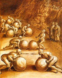 Avari e prodighi